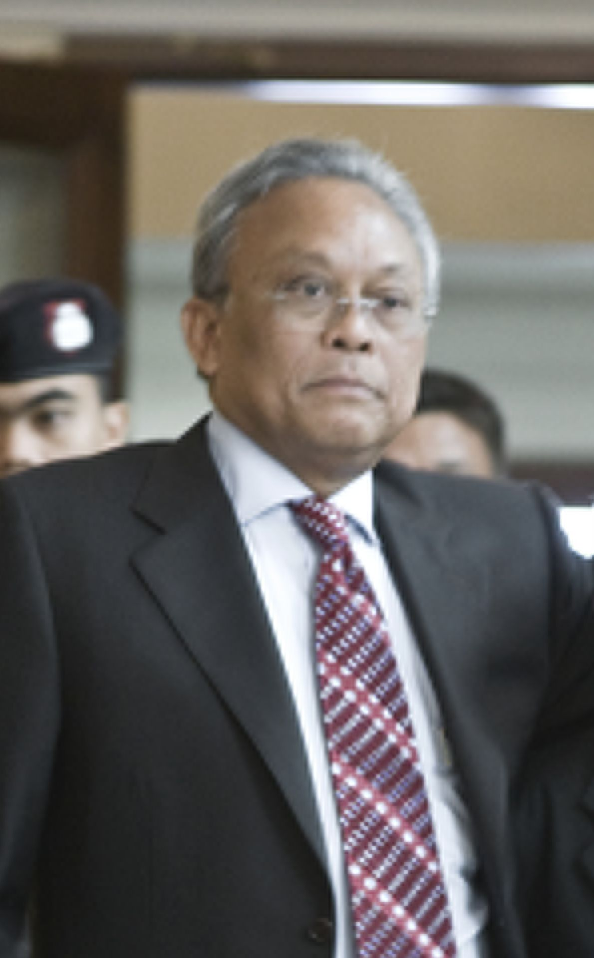 "Thep Thug" Suthep Thaugsuban นายสุเทพ เทือกสุบรรณ รองนายกรัฐมนตรี ณ ทำเนียบรัฐบาล 18 กันยายน 2552 (The Official Site of The Prime Minister of Thailand Photo by พีรพัฒน์ วิมลรังครัตน์)